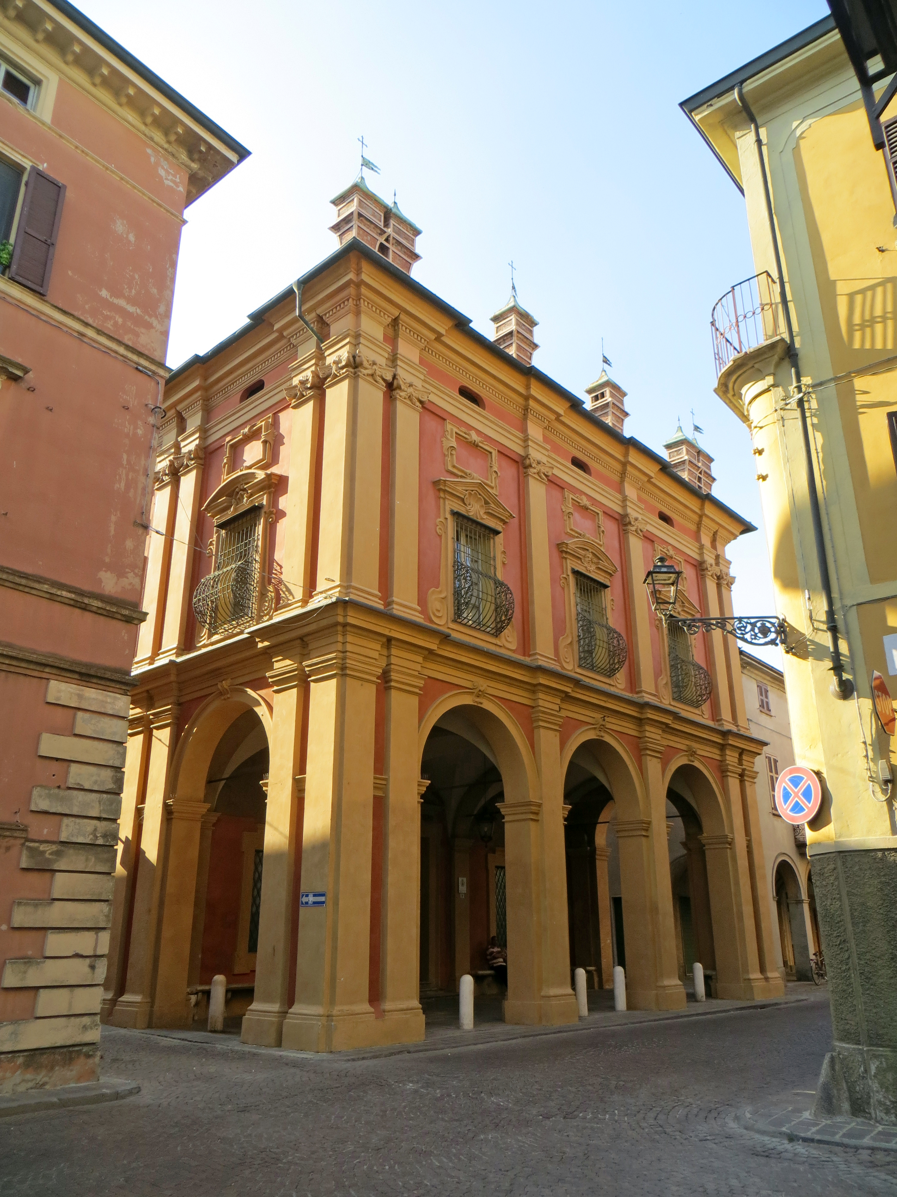 Palazzo del Monte di Pietà (Busseto) - facciata